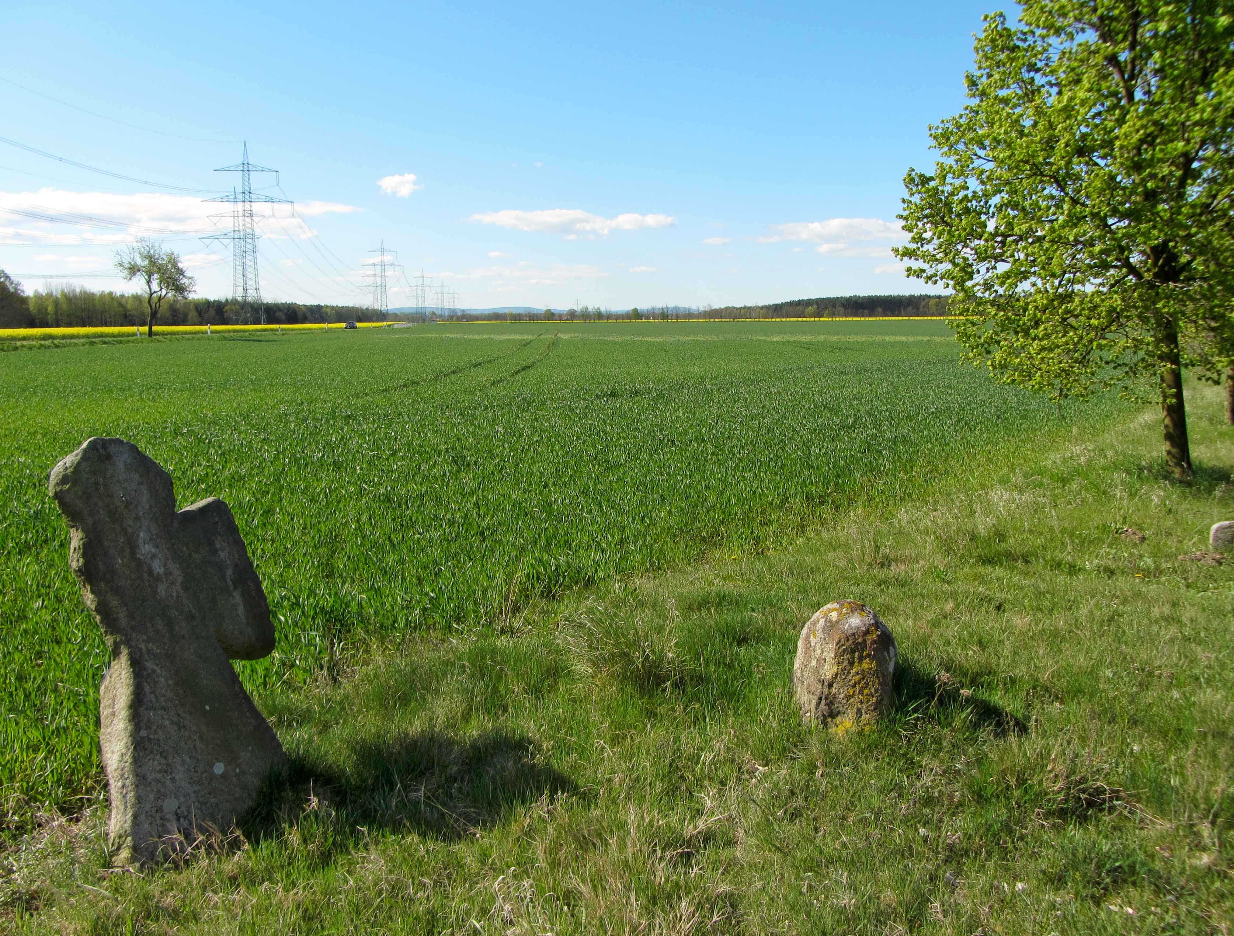 Steinkreuze Droben II und Droben I Hornjoserbsce: Kamjentnej křižej blisko Drobow